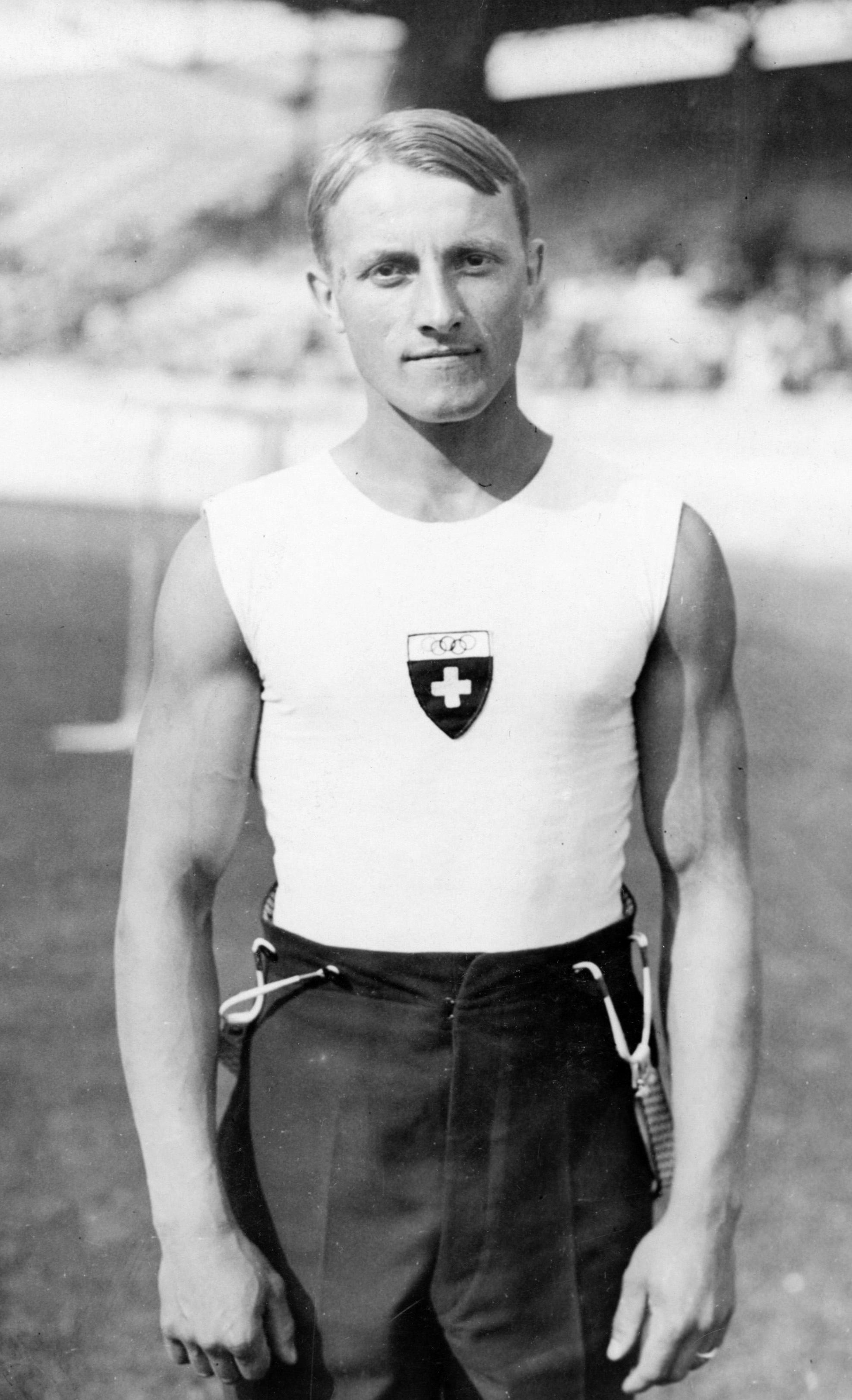 Sport, Olympische Spelen Amsterdam, 1928 : De Zwitser George Miez, olympisch kampioen turnen.